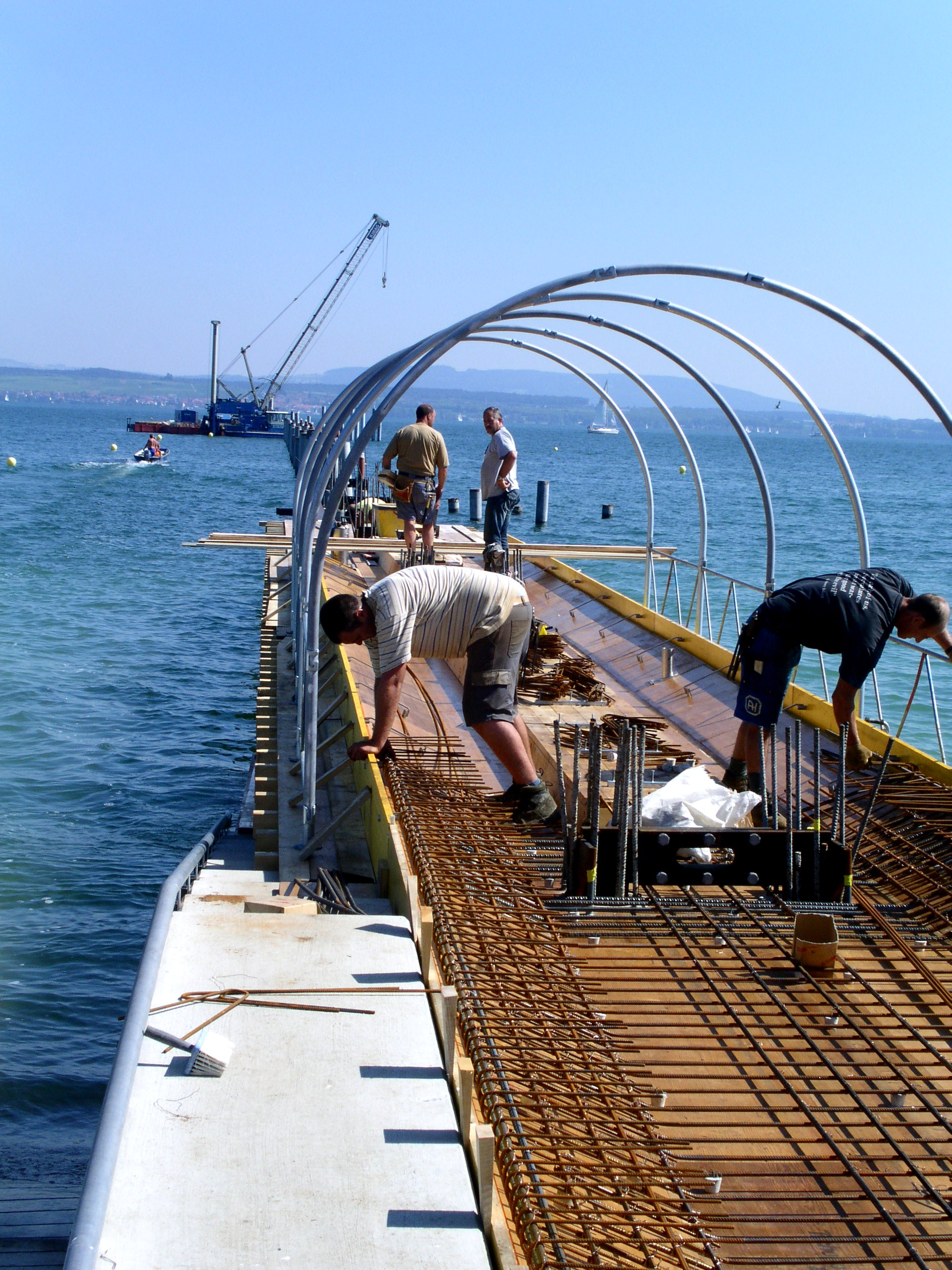 Der Bau im Jahre 2010